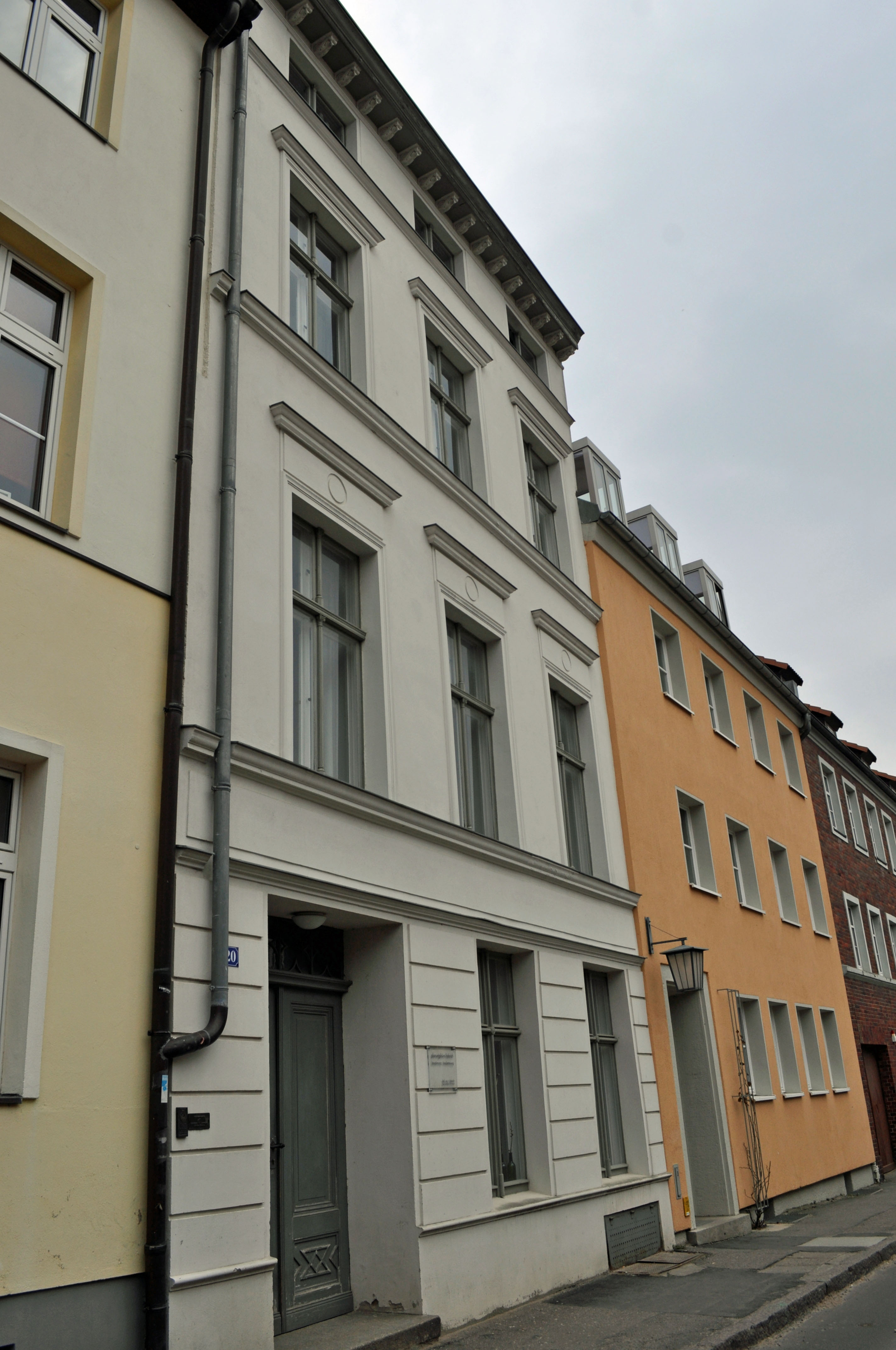 Gebäude bzw. Gebäudedetail in Stralsund. Straße und Hausnummer siehe Dateiname.